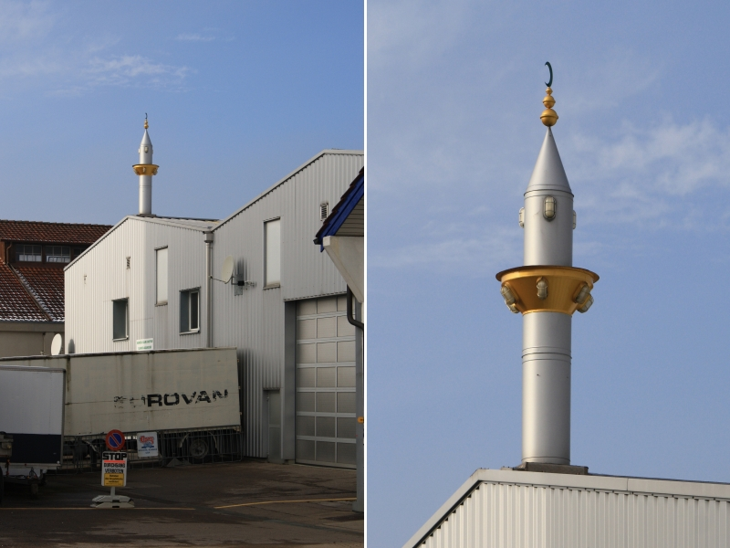 Moschee der Islamisch-Albanischen Gemeinschaft in Winterthur-Grüze, Schweiz